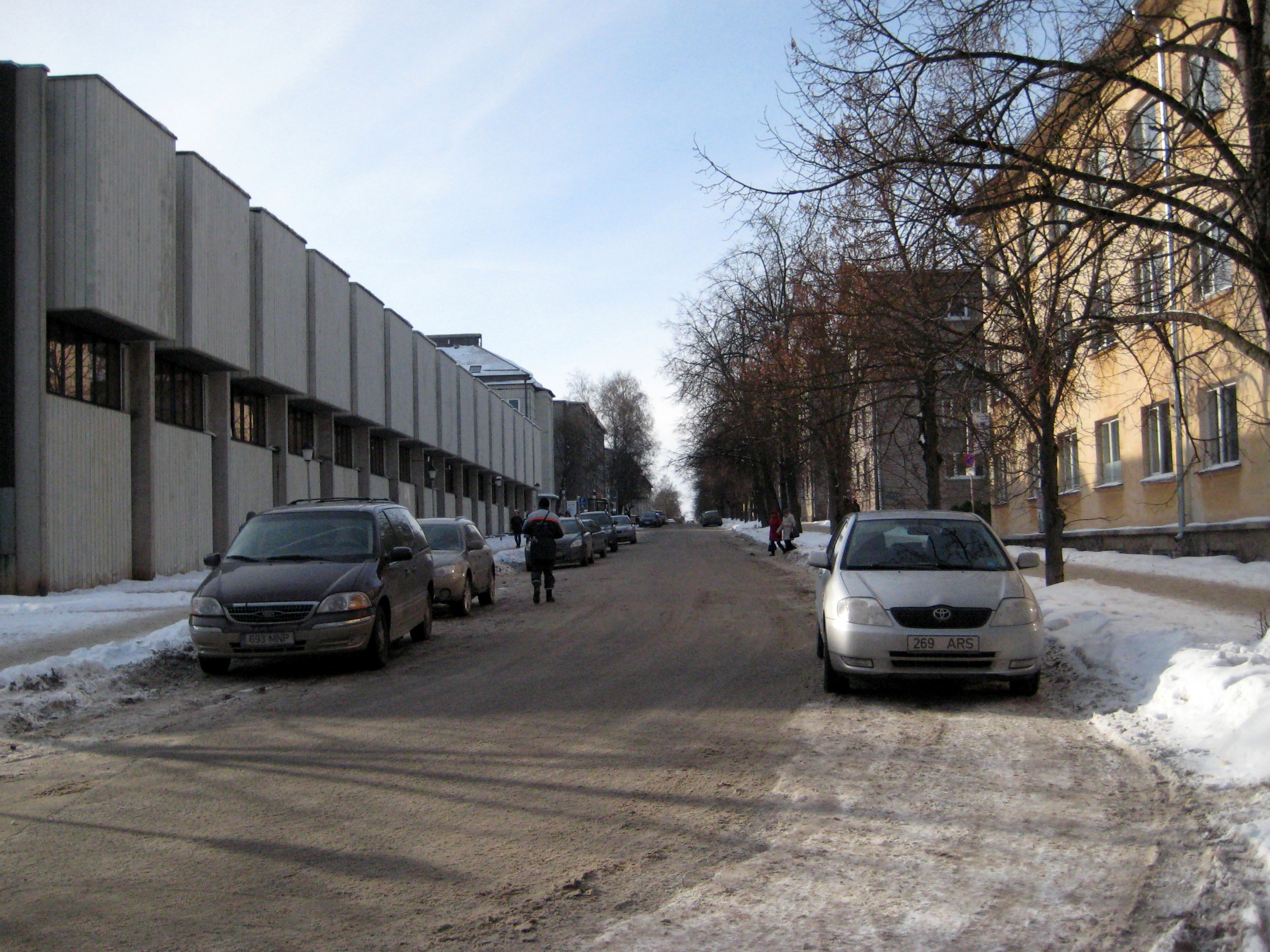 Tiigi tänava algus, Tartu